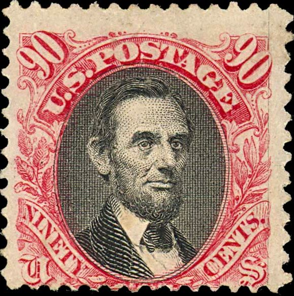 US Postage Issue: Abraham_Lincoln_1869_Issue-90c.jpg